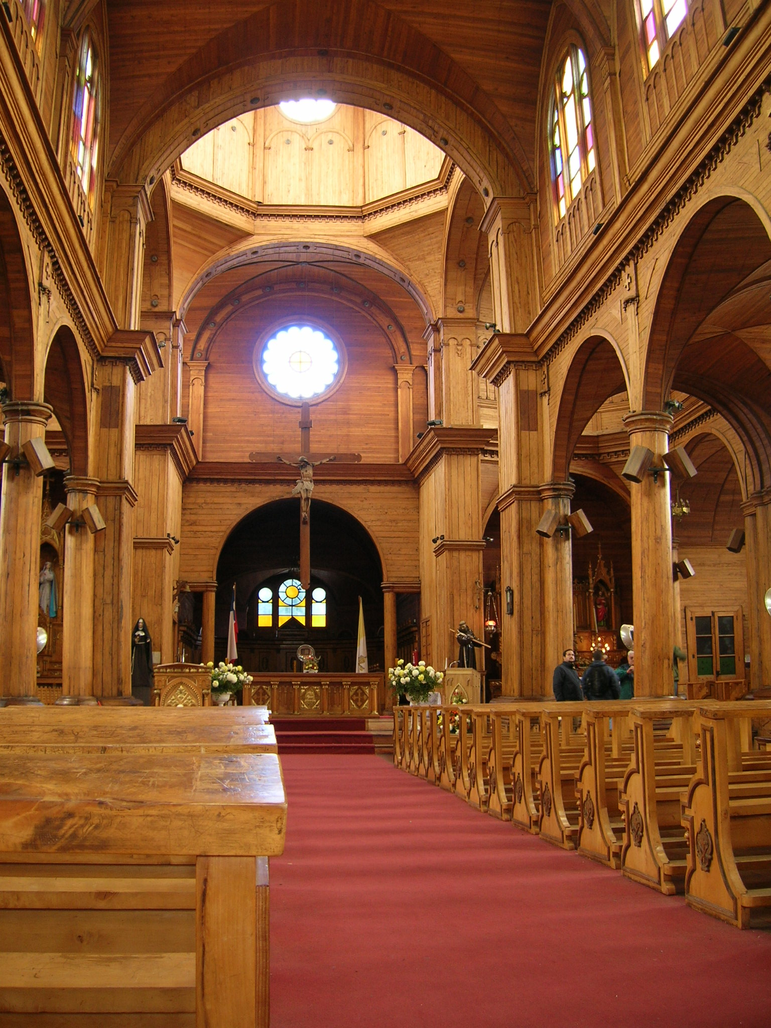 Interior Iglesia San Francisco de Asís